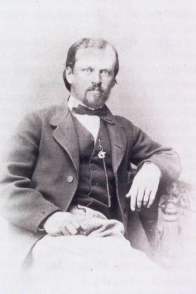 Ruukinpatruuna Robert Björkenheim (1835–1878).